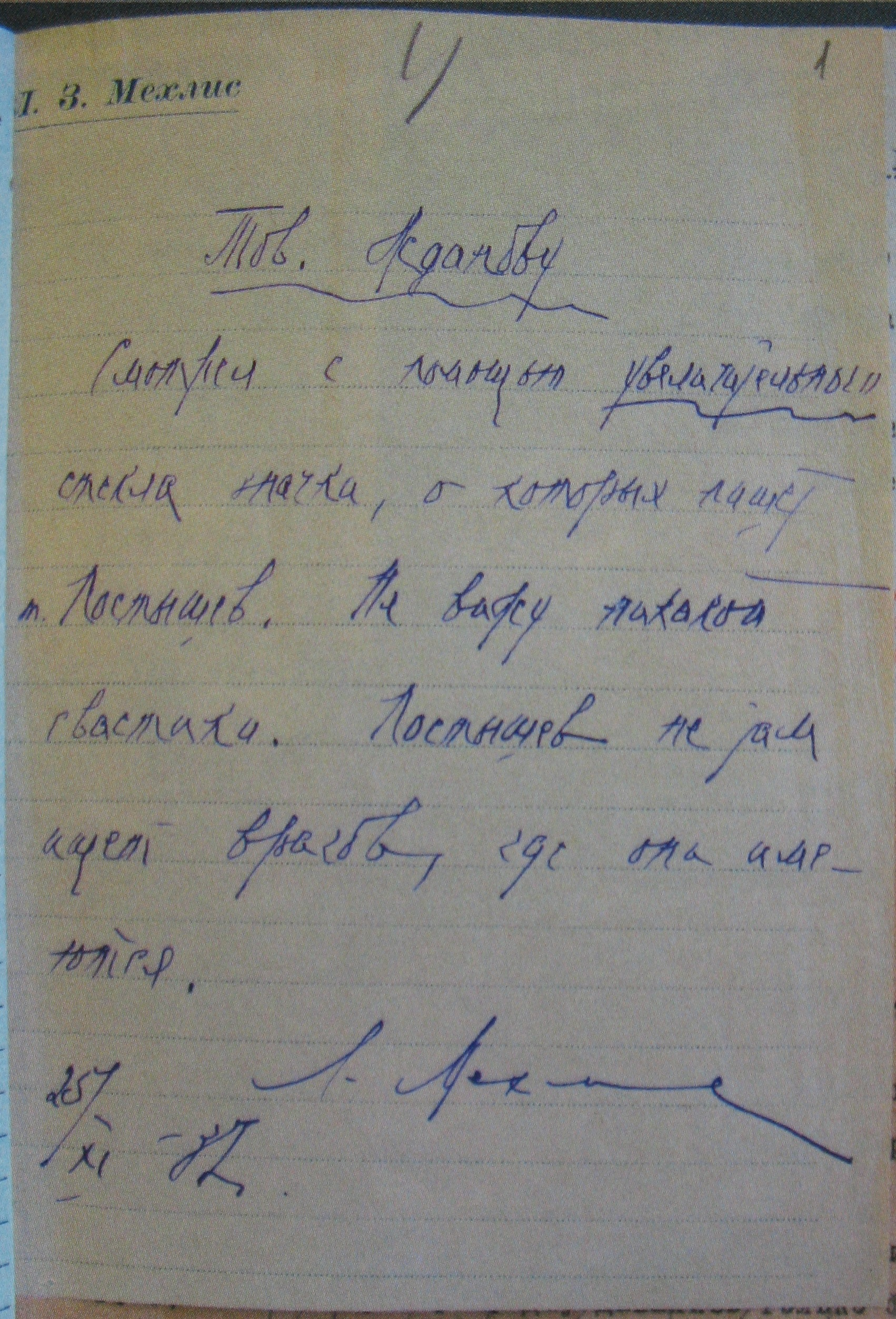 Soviet politican Lev Mehlis signature (1937).